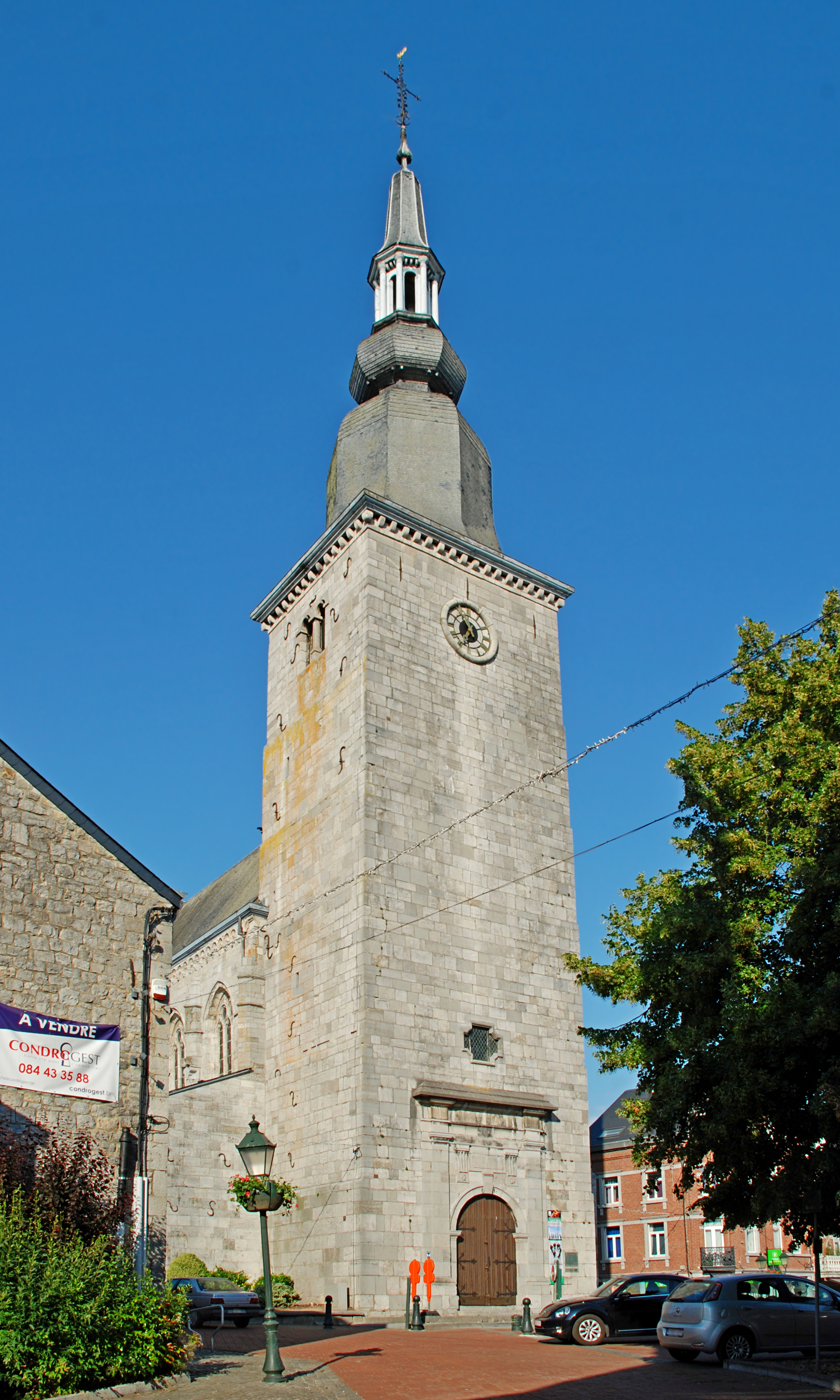 Belgique - Province de Luxembourg - Marche-en-Famenne - Place Roi Albert - Église Saint-Remacle